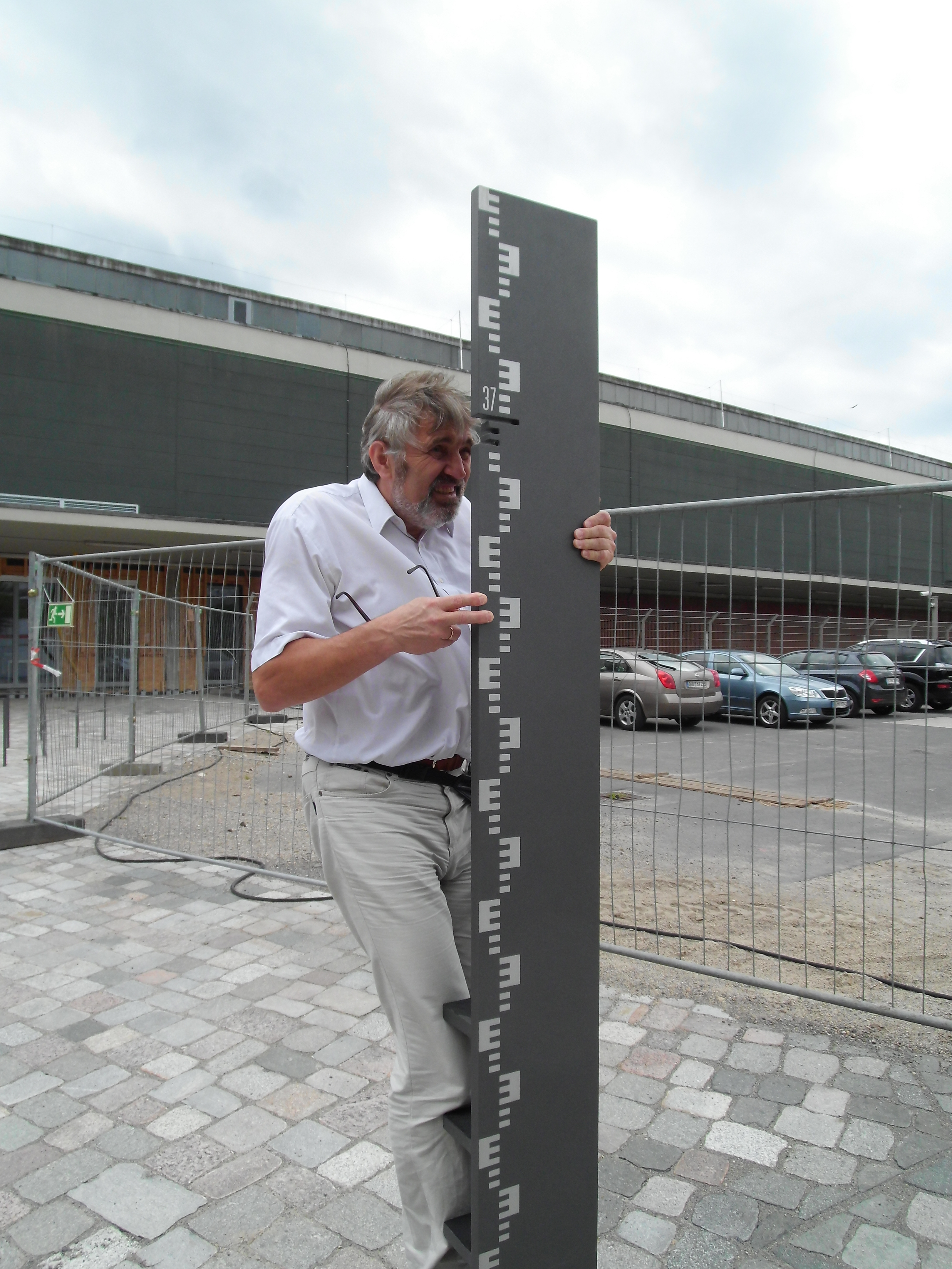 Die Stele wurde am 26.10.2012 frei gegeben.